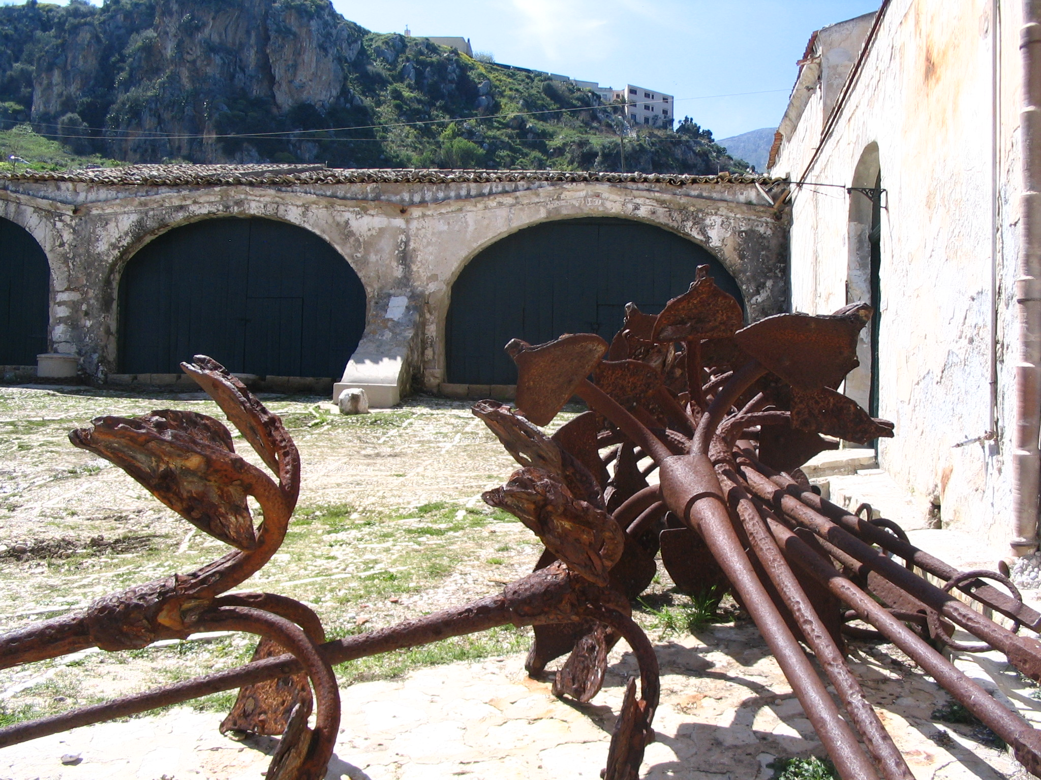 Plage de la Tonnara di Scopello